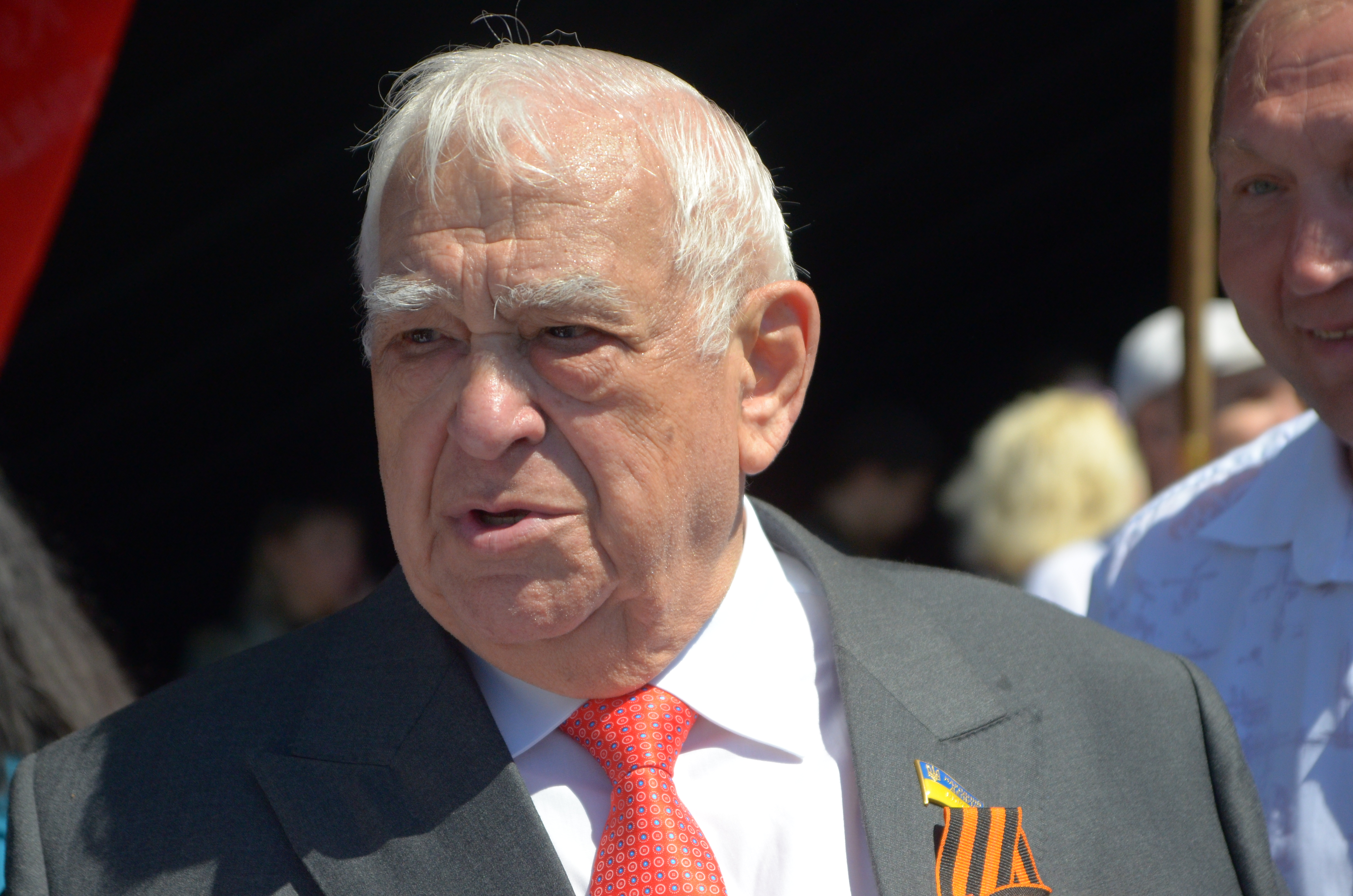 День Победы в Донецке